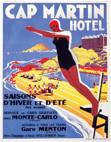 Affiche publicitaire du cap Martin Illustrée par Jonderer à l'Imprimerie Monégasque - Monte-Carlo